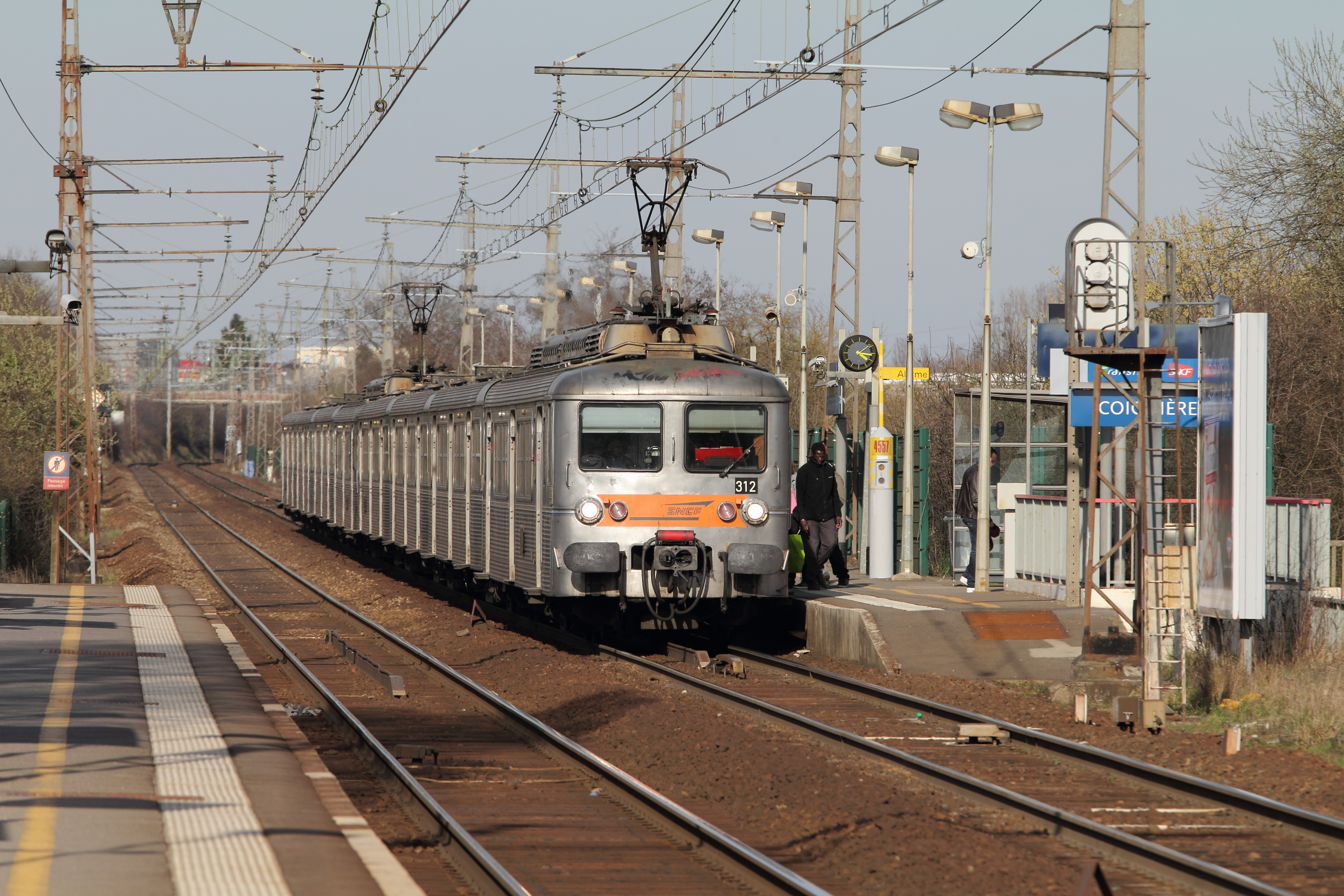 La Z 5312 en gare de Coignières assurant un train en direction de Rambouillet en Mars 2011, Yvelines, France.